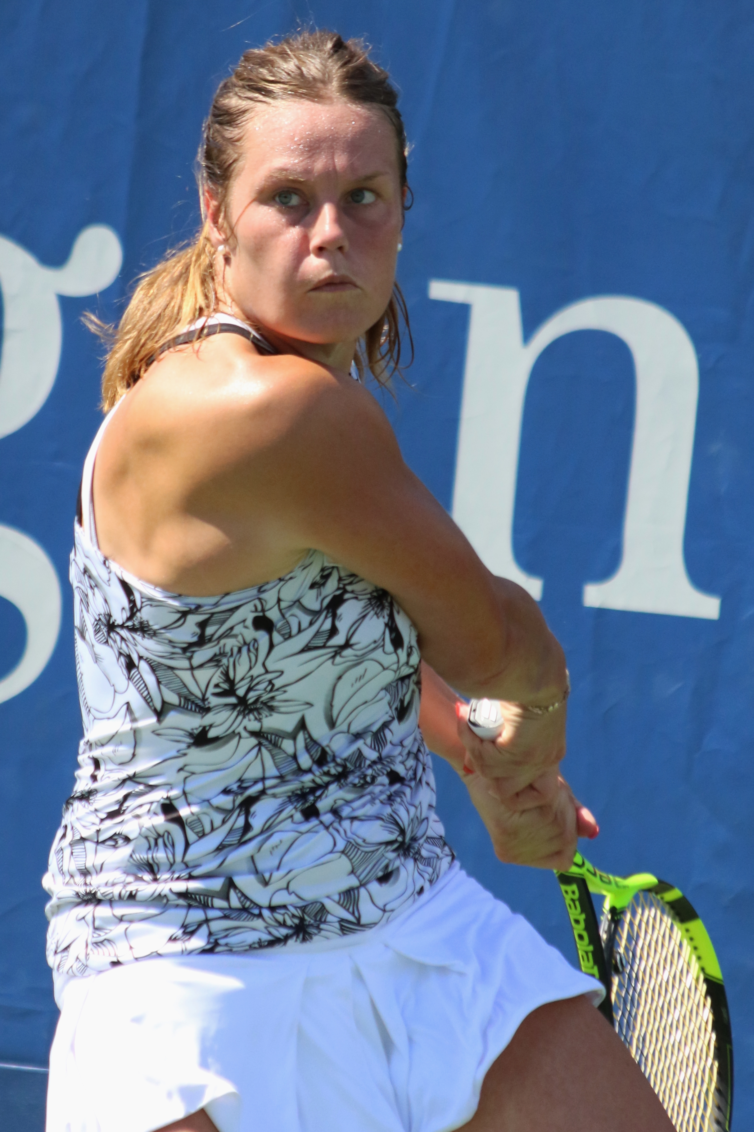 Knapp US16 (5)